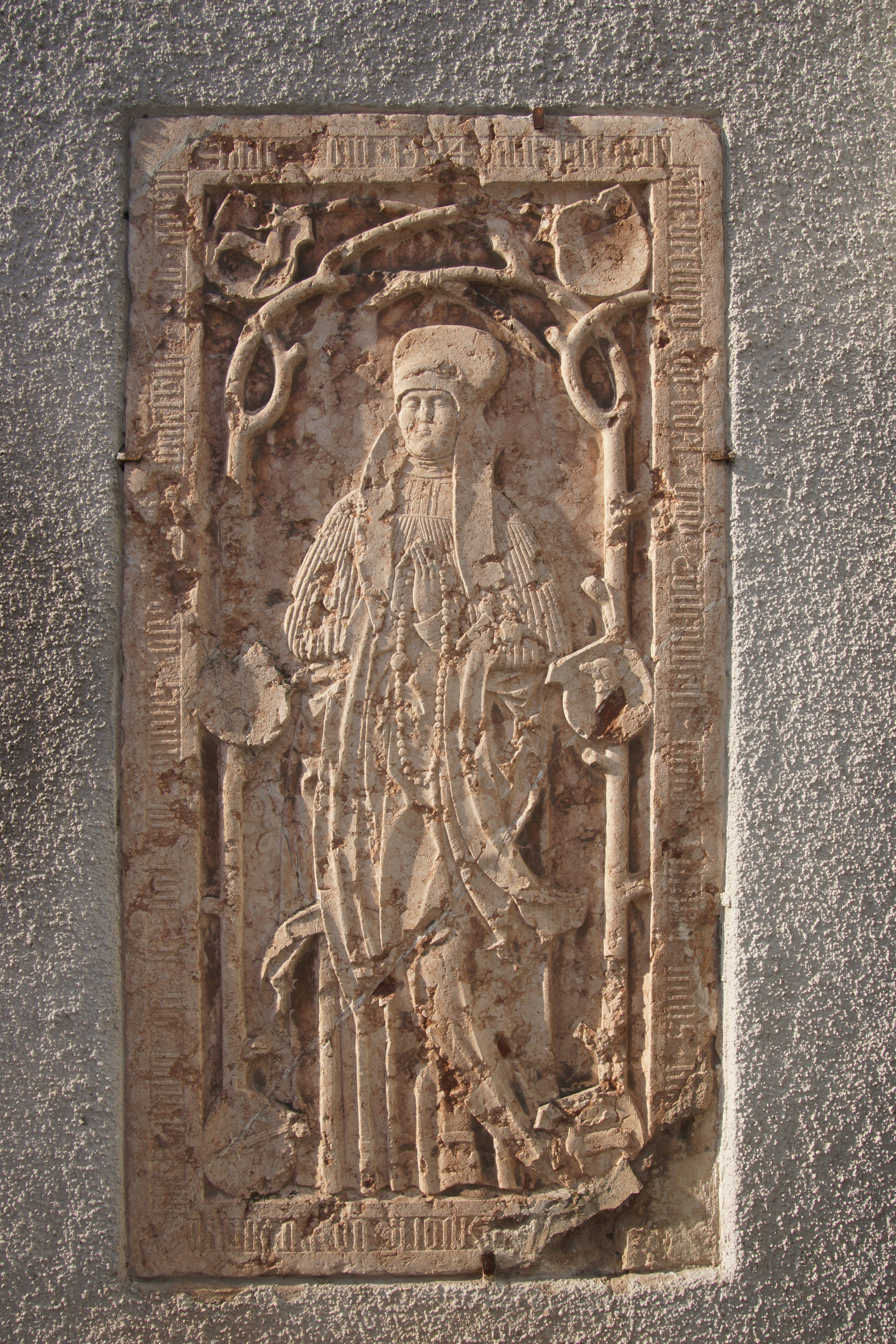 Die katholische Pfarrkirche St. Georg in Pressath